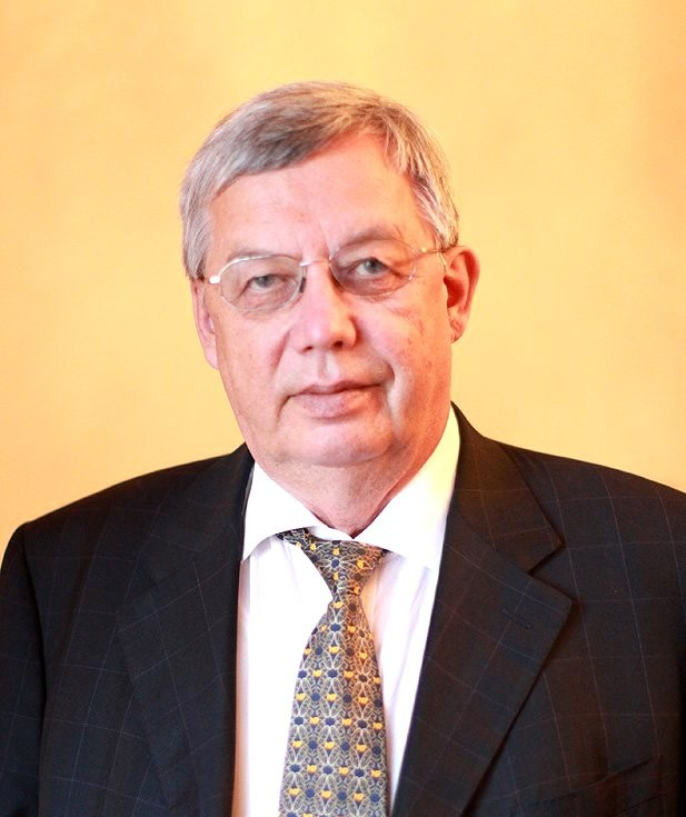 Валентин Павлович Гапонцев